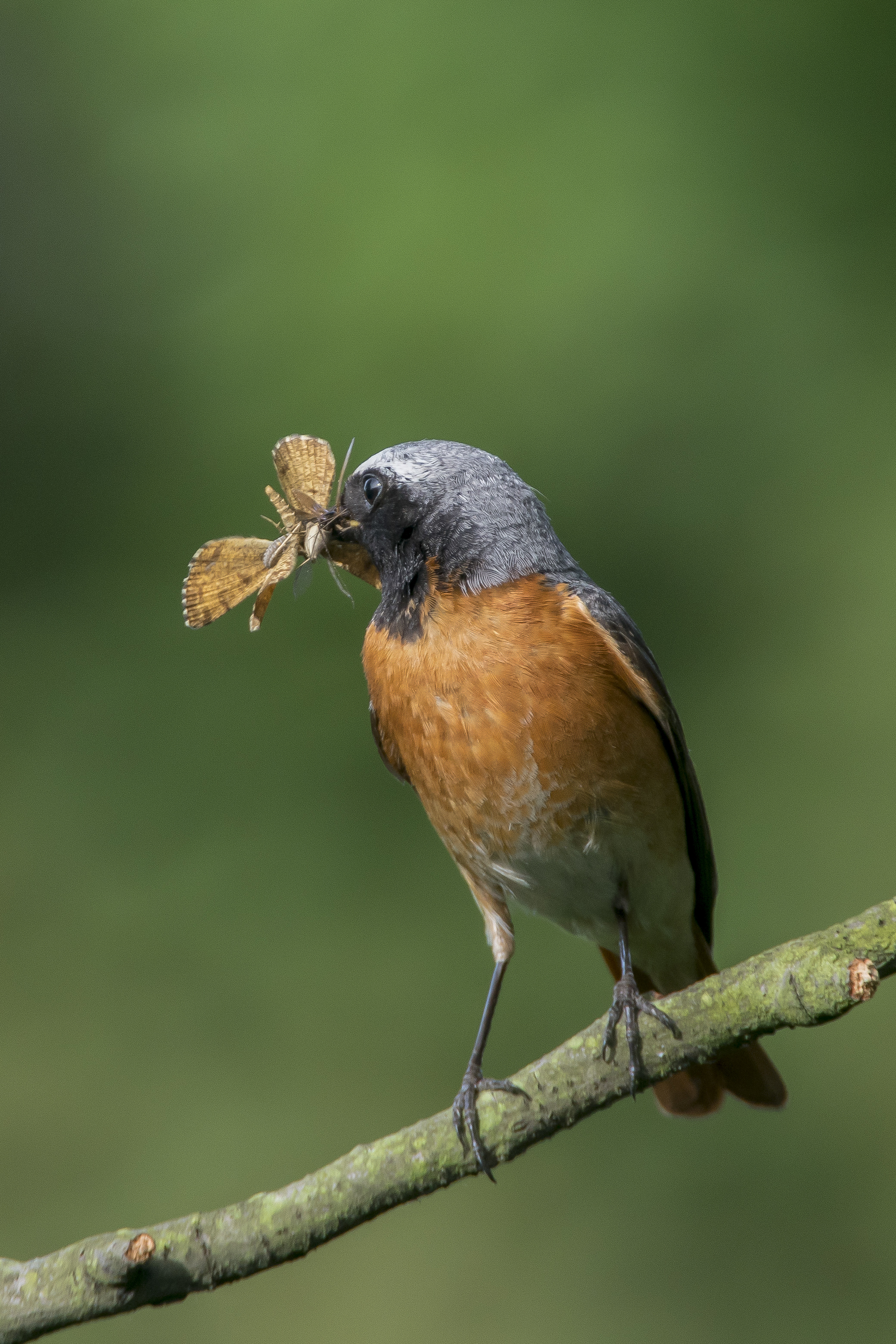 Samiec pleszki zwyczajnej z ćmą Ematurga atomaria, Łódź (Polska)